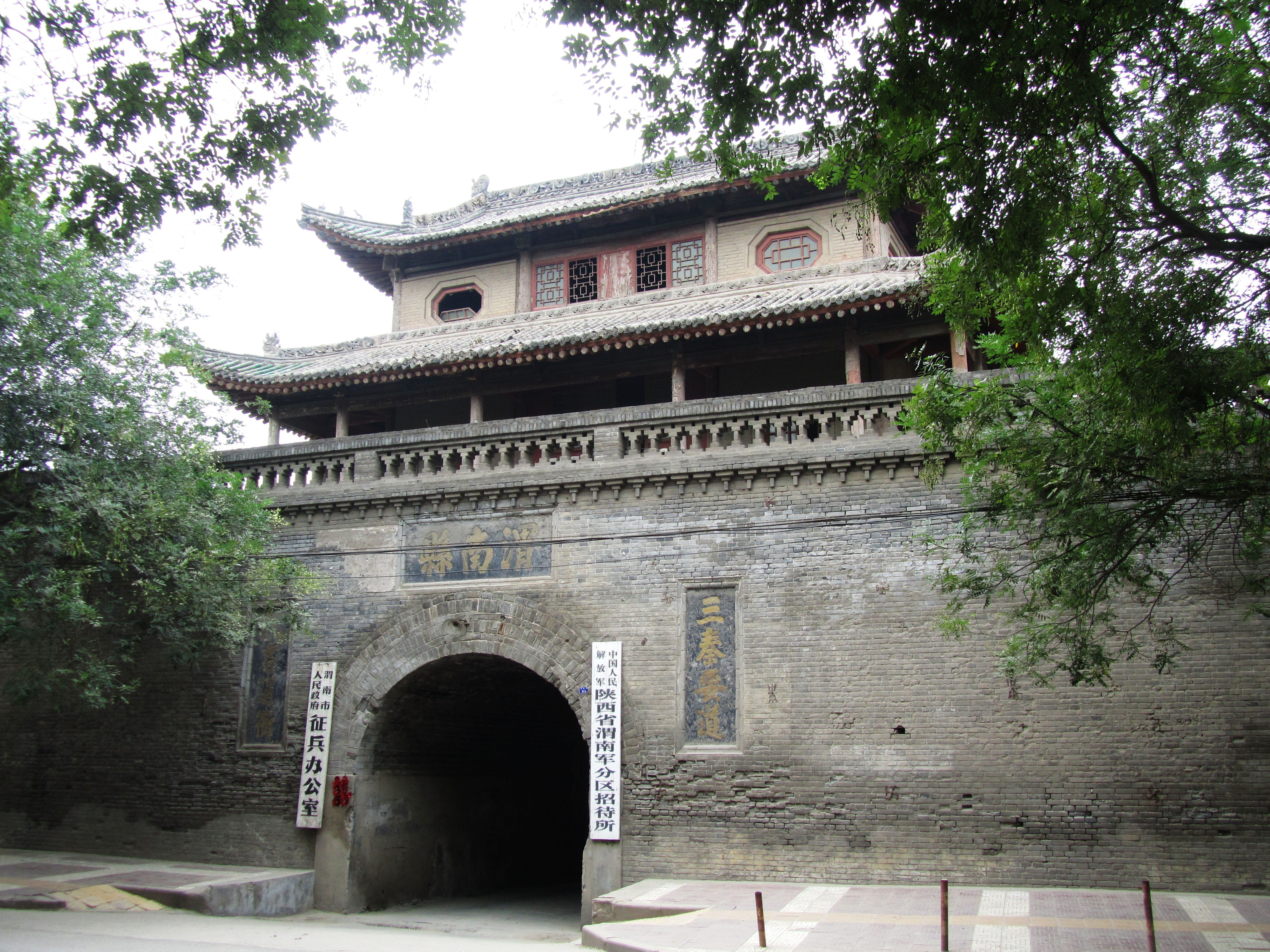 位于渭南老城街上的鼓楼。